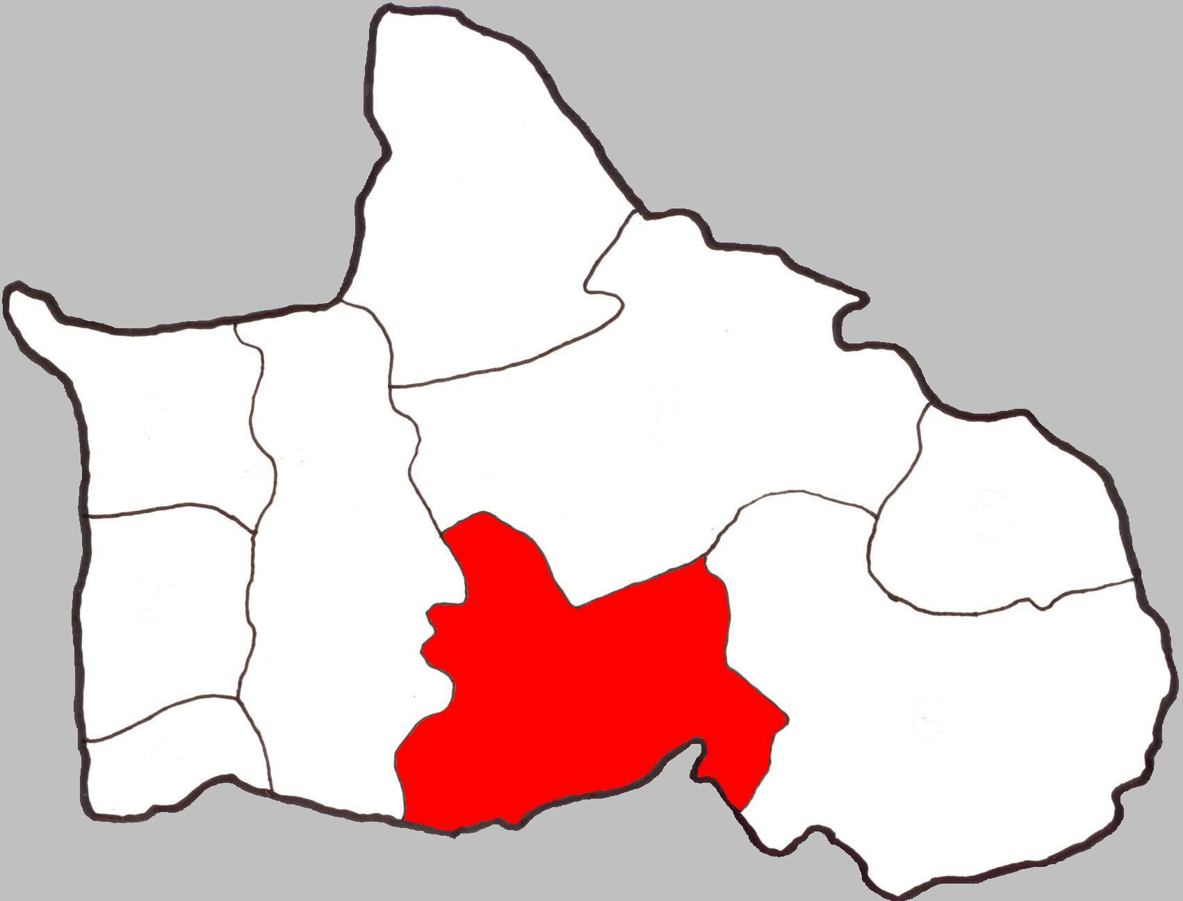 Map of Tambon Phailom, Bang Krathum, Phitsanulok, Thailand